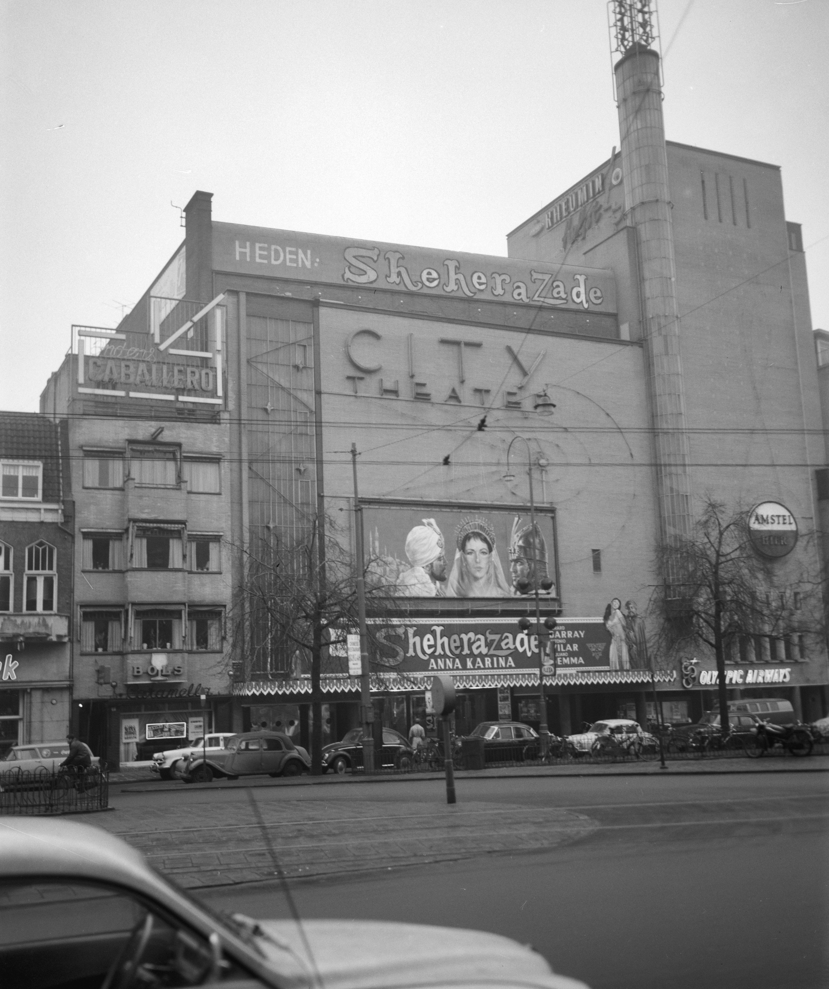 Collectie / Archief : Fotocollectie Anefo Reportage / Serie : [ onbekend ] Beschrijving : Opdracht Citytheater, exterieur City van de film Sheherazade Datum : 22 januari 1964 Instellingsnaam : City Theater Fotograaf : Bilsen, Joop van / Anefo Auteursrechthebbende : Nationaal Archief Materiaalsoort : Negatief (zwart/wit) Nummer archiefinventaris : bekijk toegang 2.24.01.04 Bestanddeelnummer : 915-9771 Reacties Geplaatst door Maaike op 15 maart 2014 - 14:03. locatie: Kleine-Gartmanplantsoen (bij Leidseplein) Plaats: Amsterdam, Noord-Holland